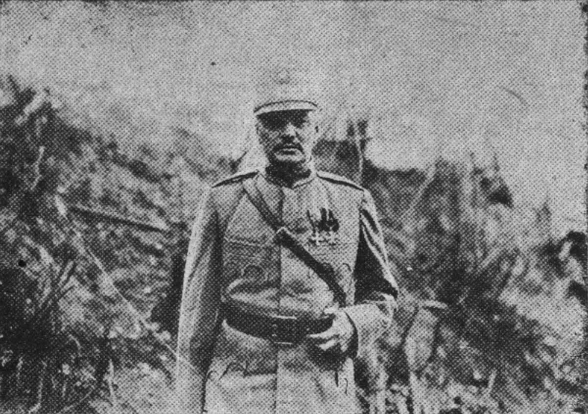 Generalul Ernest Broșteanu, România - Comandantul Diviziei 11 Infanterie din România, în Basarabia